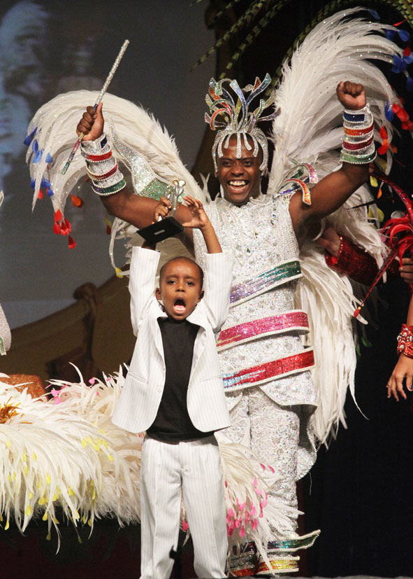 Fotógrafo Henrique Matos